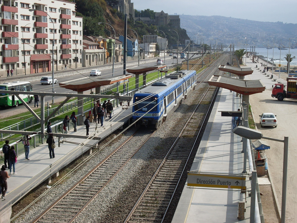 Llegando a la estación Caleta Portales del Merval (Metro Regional de Valparaíso) Desde hace un par de años que el metro del Gran Valparaíso se remodeló por completo y es tan cómodo, rápido y limpio ( o más) que el de Santiago. Si se fijan, a la derecha está la playa y obviamente, el mar, un panorama envidiable para viajar.